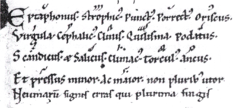 Neumentabelle , so genannte Tabula brevis aus Maria Laach, rheinische Notation. 12. Jahrhundert Text in Hexametern zum Auswendiglernen